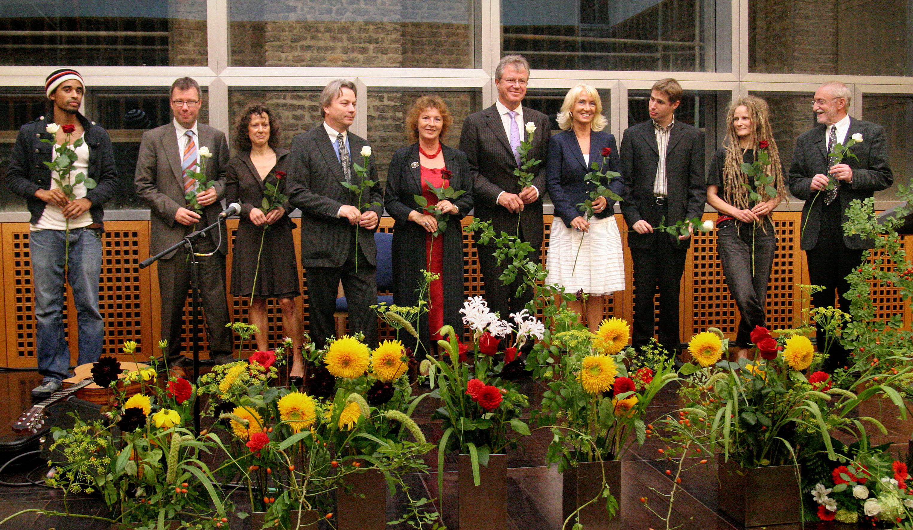 Verleihung des Heimito von Doderer Preises an Daniel Kehlmann 2006 in Köln. Kehlmann ist der dritte von rechts. Der Stifter des Preises, Henner Löffler, ist der fünfte von rechts. Der Förderpreis ging an Kerstin Młynkec, zweite von rechts. Das Bild zeigt noch Mitglieder der Jury wie Martina Eichner (vierte von rechts), Vertreter der Stadt Köln wie die damalige Bürgermeisterin Angela Spizig (sechste von rechts), etc.